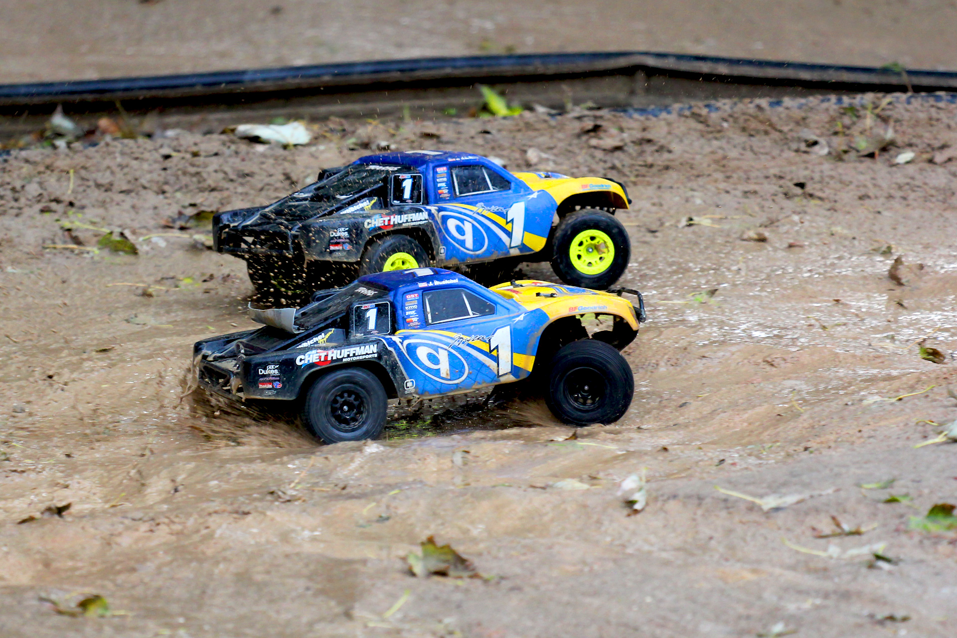 Боротьба моделей шорткорсів